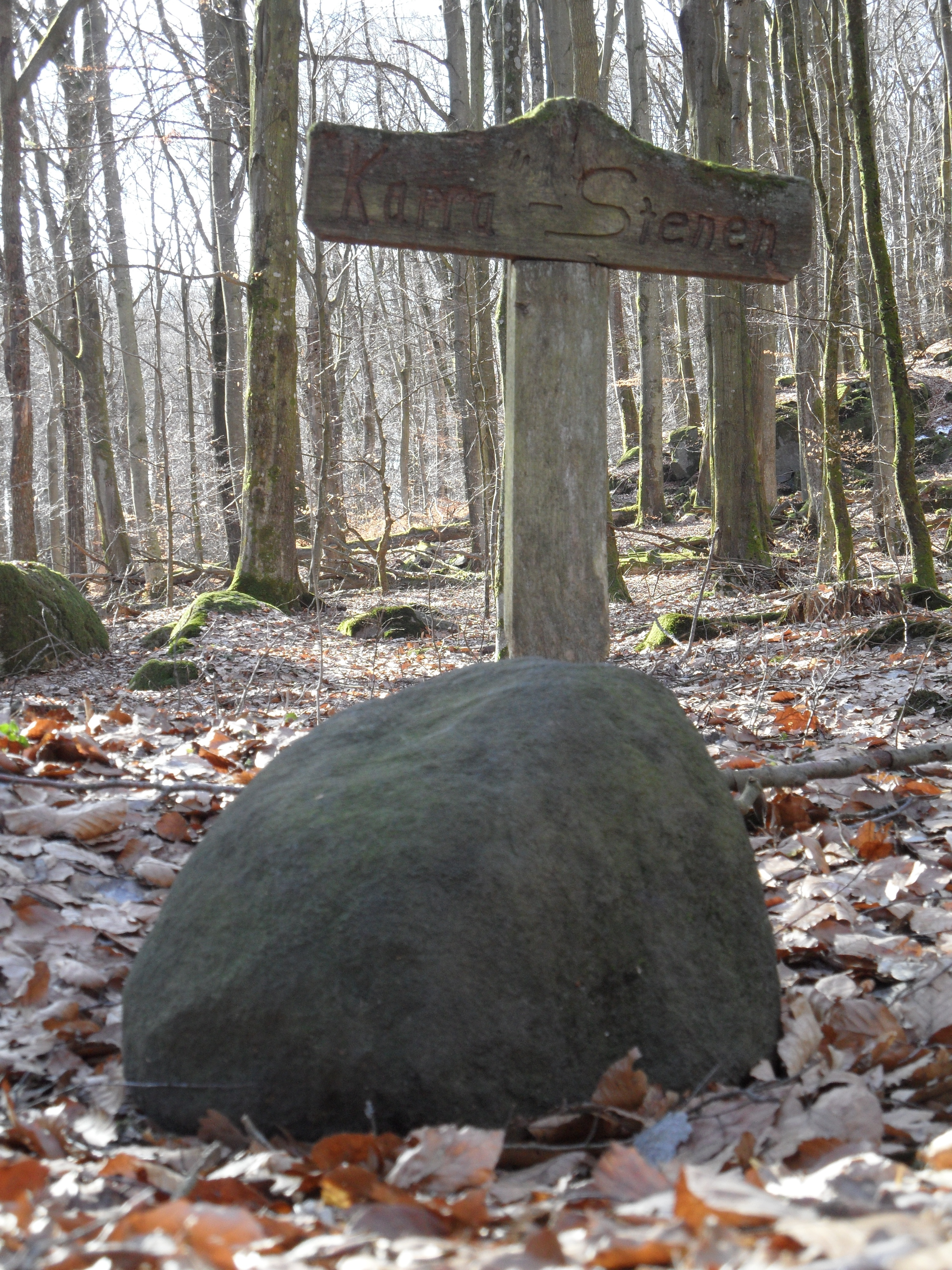 "Karrastenen" i naturreservatet Allarps bjär